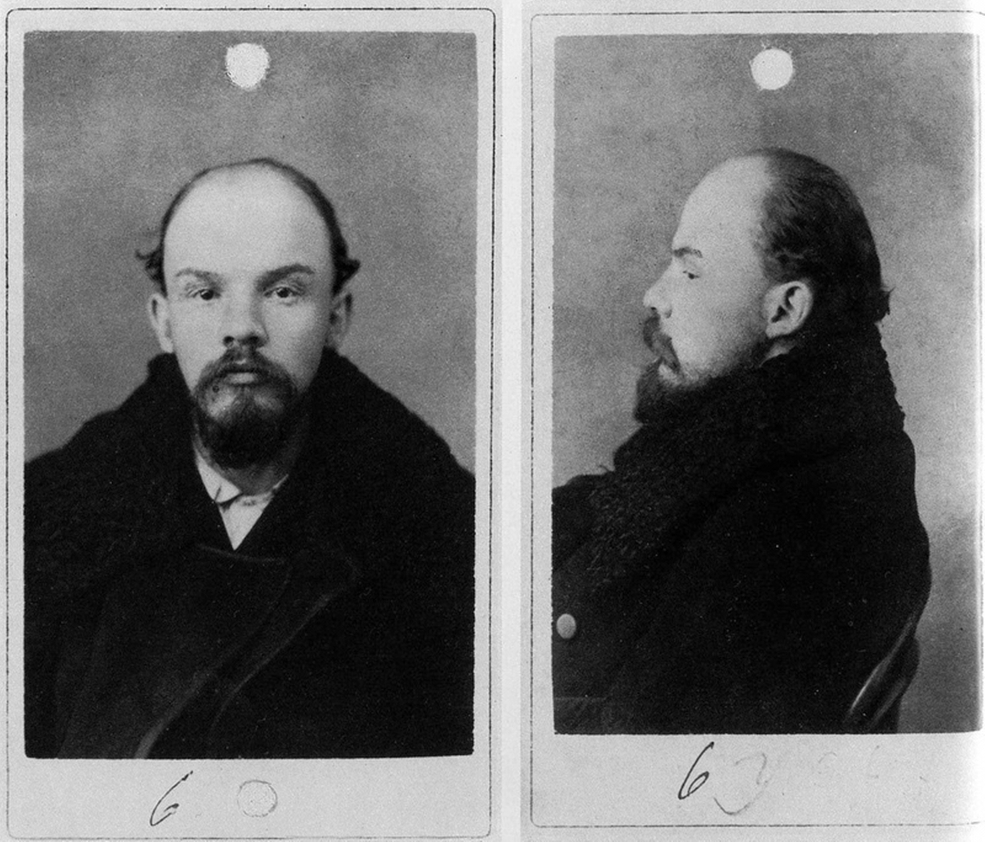 Lenin'in sabıka resmi, 1895